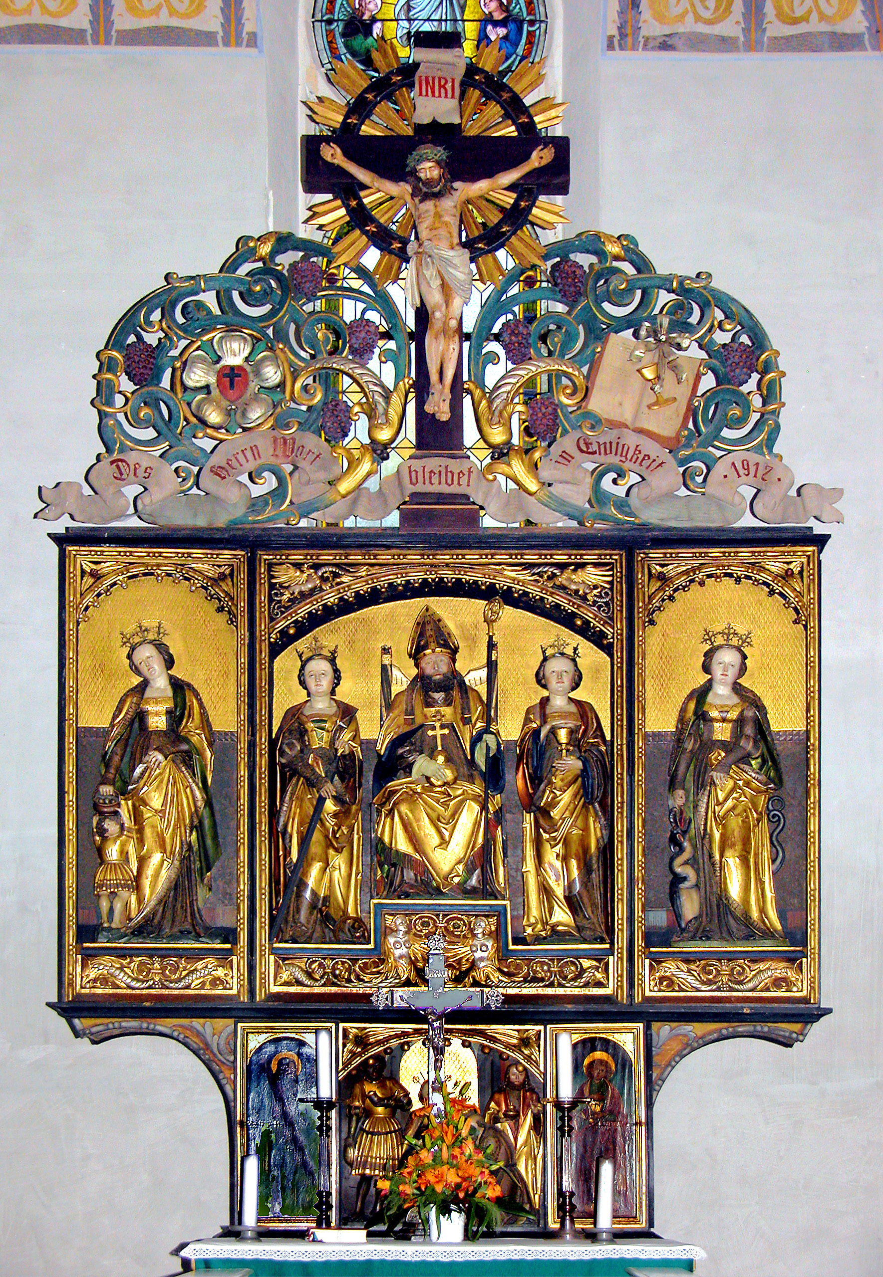 12.09.2011 09627 Oberbobritzsch (Bobritzsch-Hilbersdorf), Kirchstraße (GMP: 50.875369,13.453209): Dorfkirche St. Nicolaus, 1392 erwähnt. Im Kern mittelalterlich, 1710 erneuert. 3(6)-flügeliger Schnitzaltar (Nikolausaltar) von 1521 von einen unbekannten Freiberger Künstler, dem sog. "Bobritzscher Meister". Der bekrönende Aufsatz von 1912 erinnert mich an von orientalischer Ornamentik unterlegtem deutschen Jugendstil. [DSCNn2743.TIF]201109122315DR.JPG(c)Blobelt